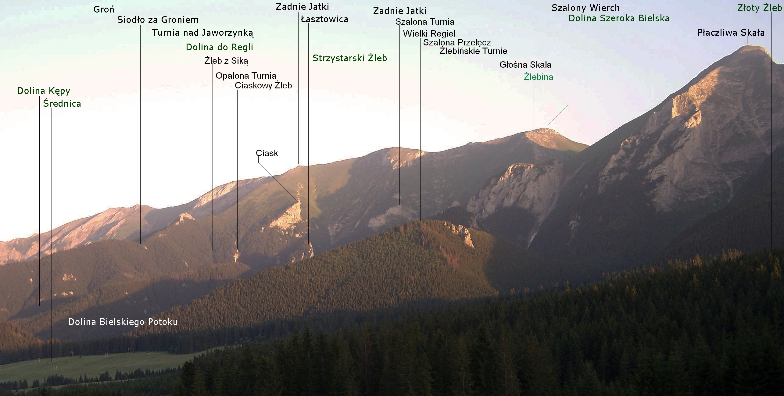 Tatry Bielskie. Widok od pólnocnego zachodu